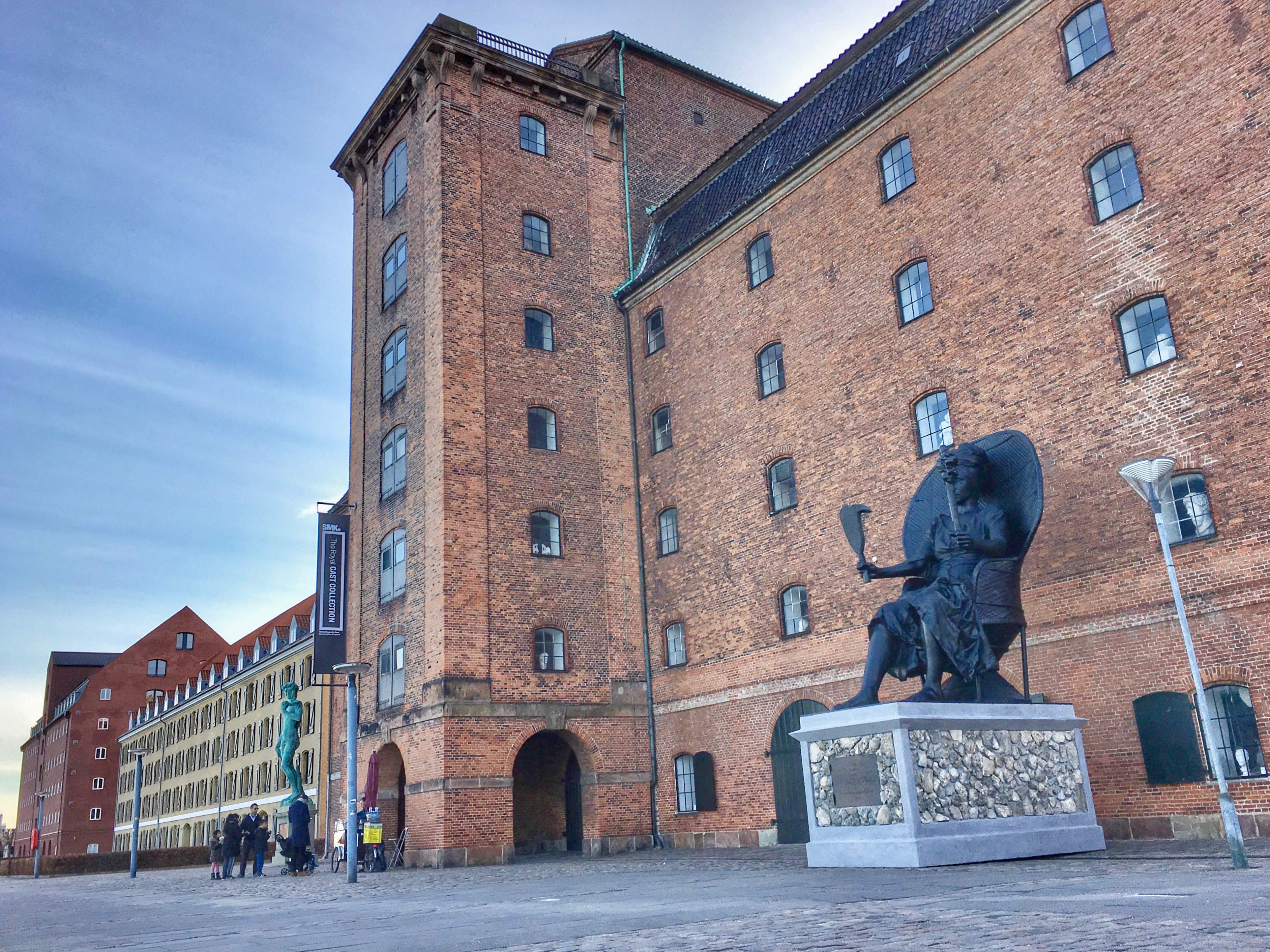 Vestindisk Pakhus' facade mod havnen